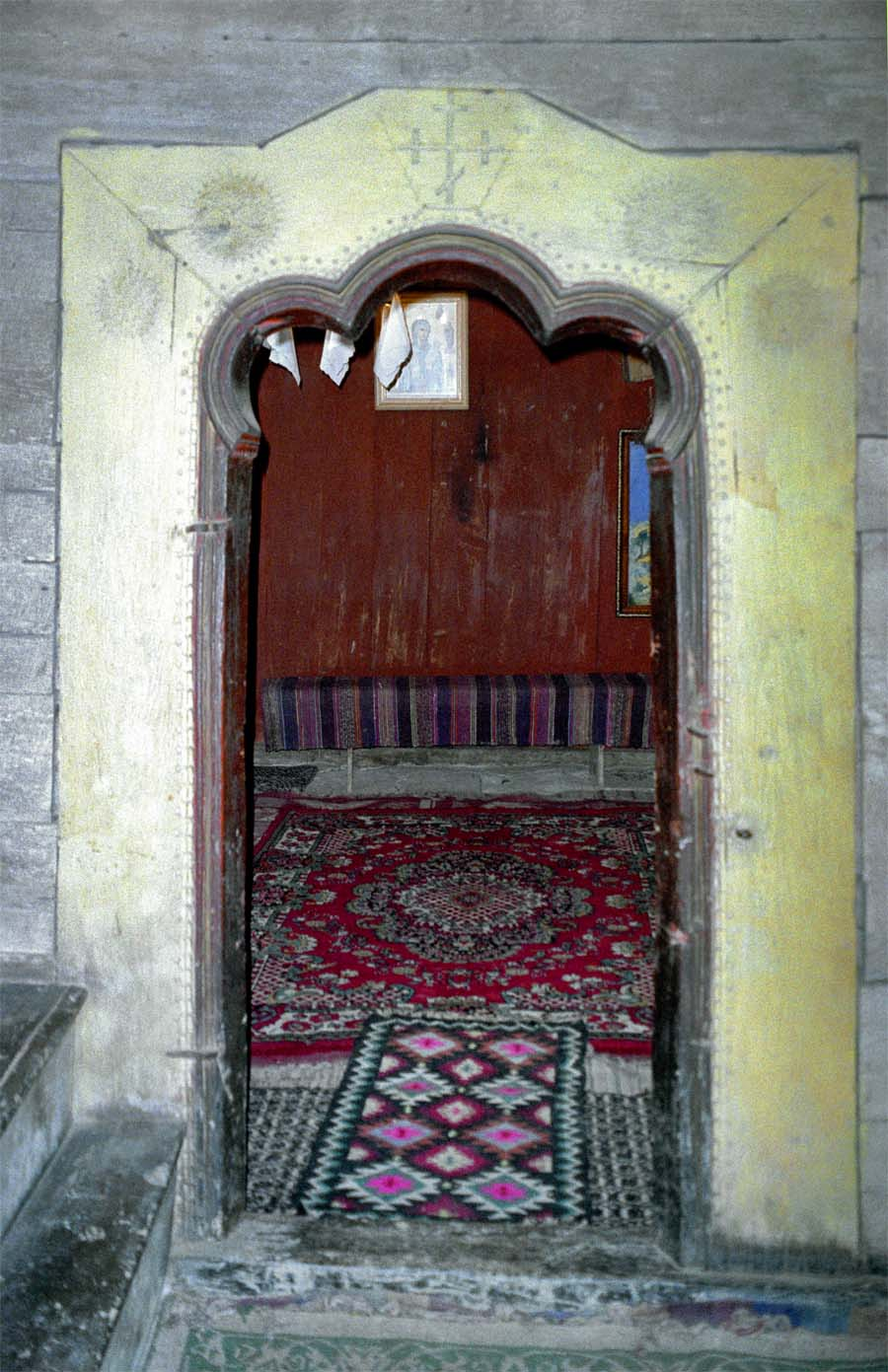 Biserica de lemn din Corjăuţi, intrarea în biserică.